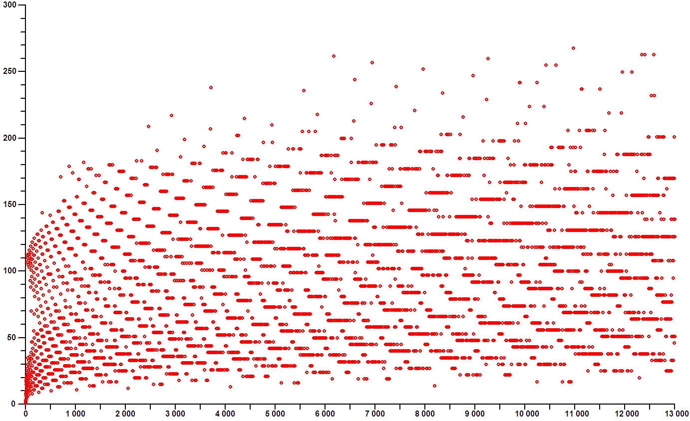 Diagrama de tiempo para 3n+1